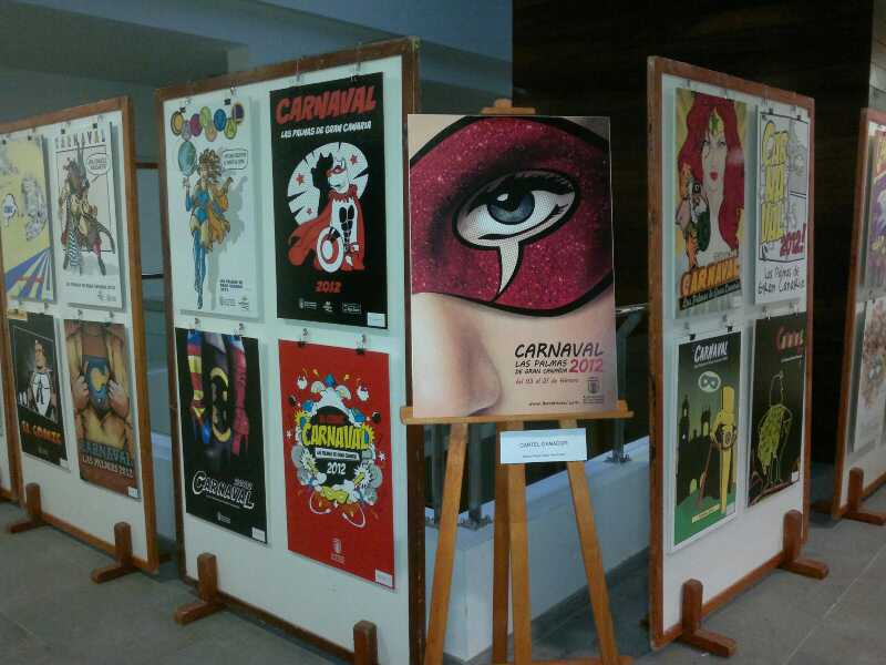 Exposición de los carteles del Carnaval de las Palmas de Gran Canaria, que se presentaron al concurso para seleccionar el cartel oficial. Cartel ganador 2012 colocado al frente.